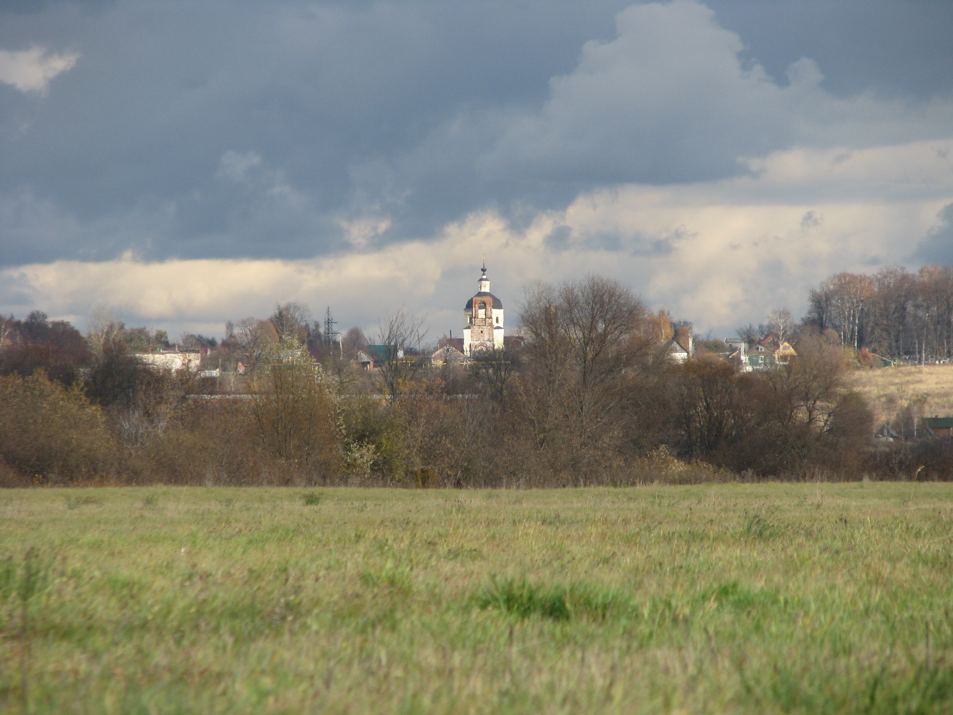 Лемешки. Вид с Боголюбского луга